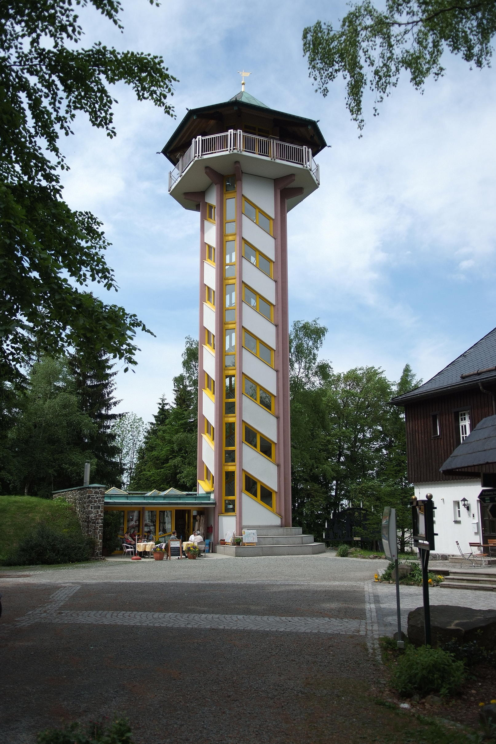 Aussichtsturm auf dem Scheibenberg